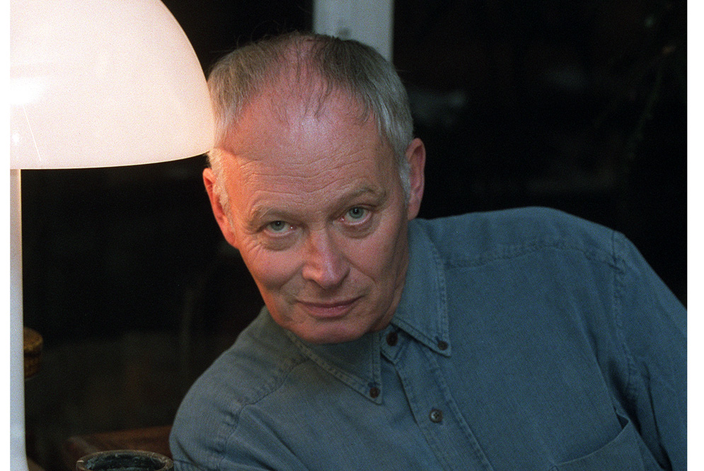 Gudbergur Bergsson